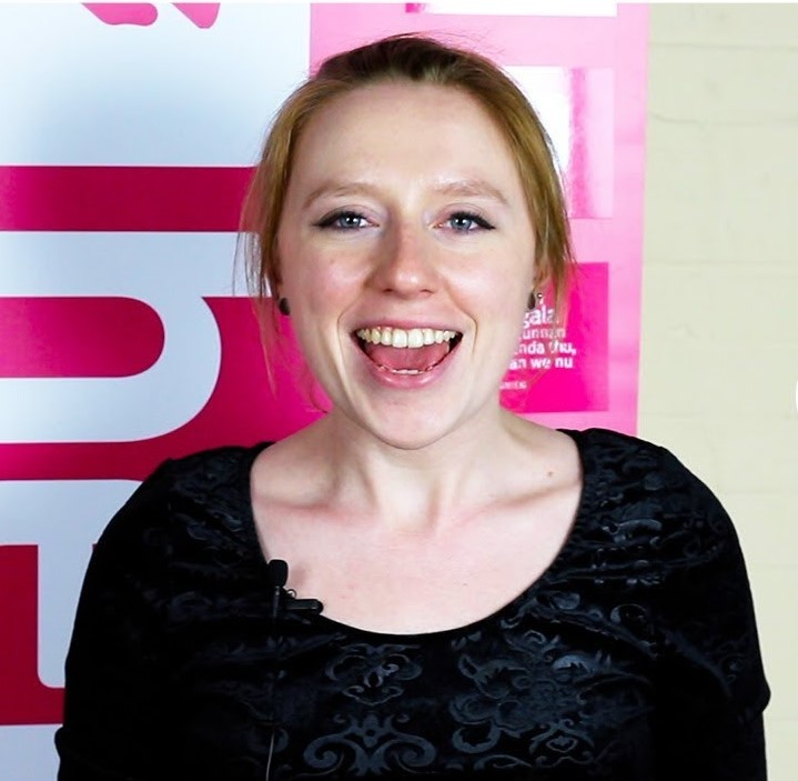 BOEKENTIPS IN 1 MINUUT – "We all know the phenomenon of time being money and I wanted to explore what it would be like if that were a concrete truth." – Sara Holland, schrijfster, New York (USA) – Gemaakt op YALFest 2018 voor Hebban.nl